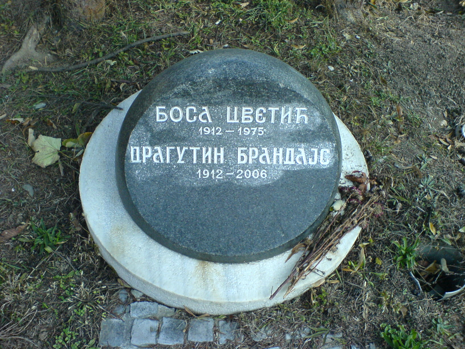 Гроб Босе Цветић и њеног супруга Драгутина у Алеји заслужних грађана на Новом гробљу у Београду.